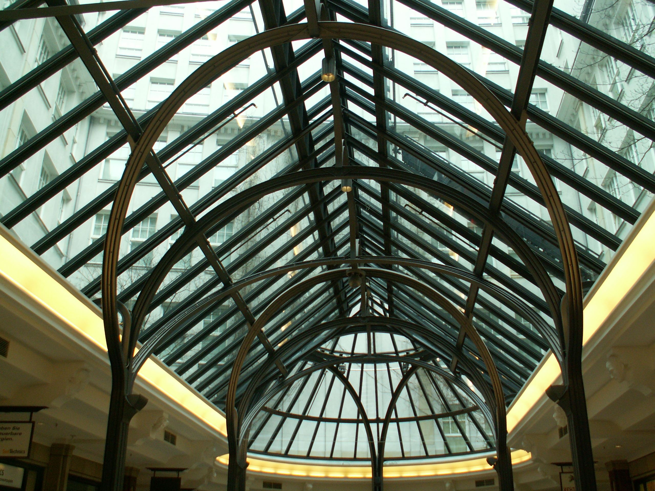 Deckenkonstruktion der Einkaufspassage im Levantehaus in Hamburg, Deutschland. Ceiling construction design of the shopping mall Levantehaus in Hamburg, Germany.